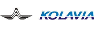 Логотип Колавиа с 1999 года по 2012 год